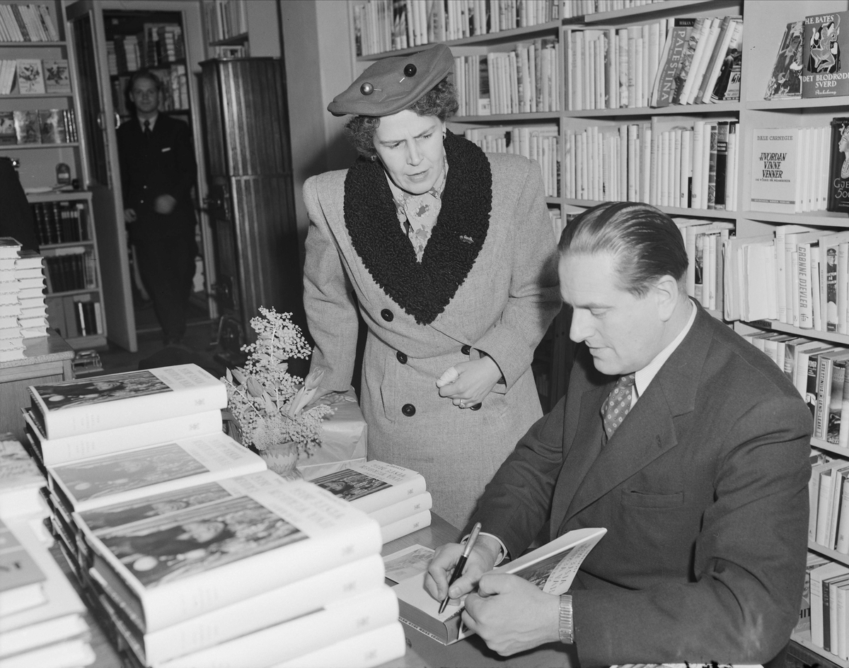 Per Høst (1907 - 1971) var en norsk zoolog og filmprodusent.